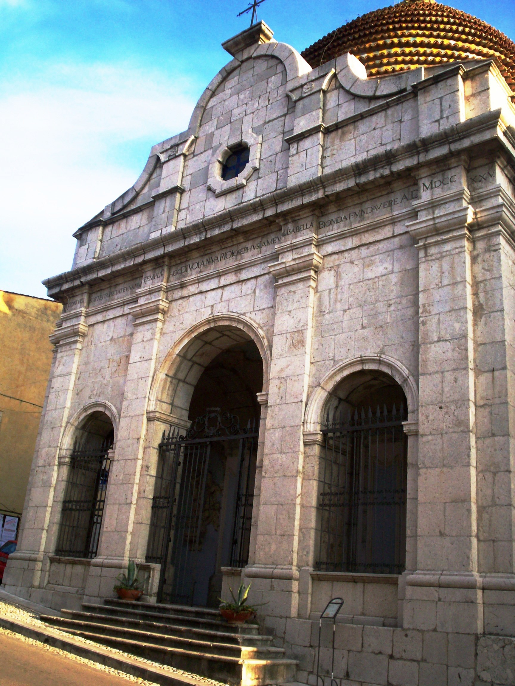 Prospetto della Chiesa di San Gennaro in Cerreto Sannita (Bn)